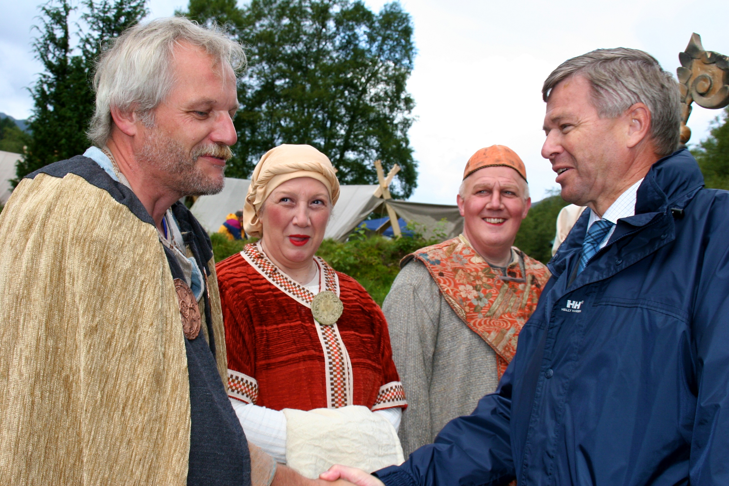 Flolid